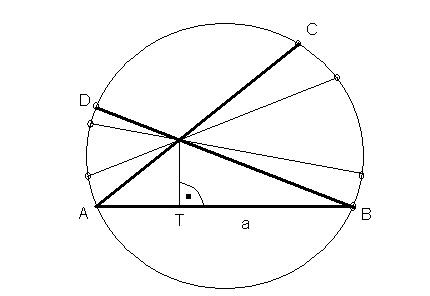 A vékony egyenesek ultraparalel egyenesek